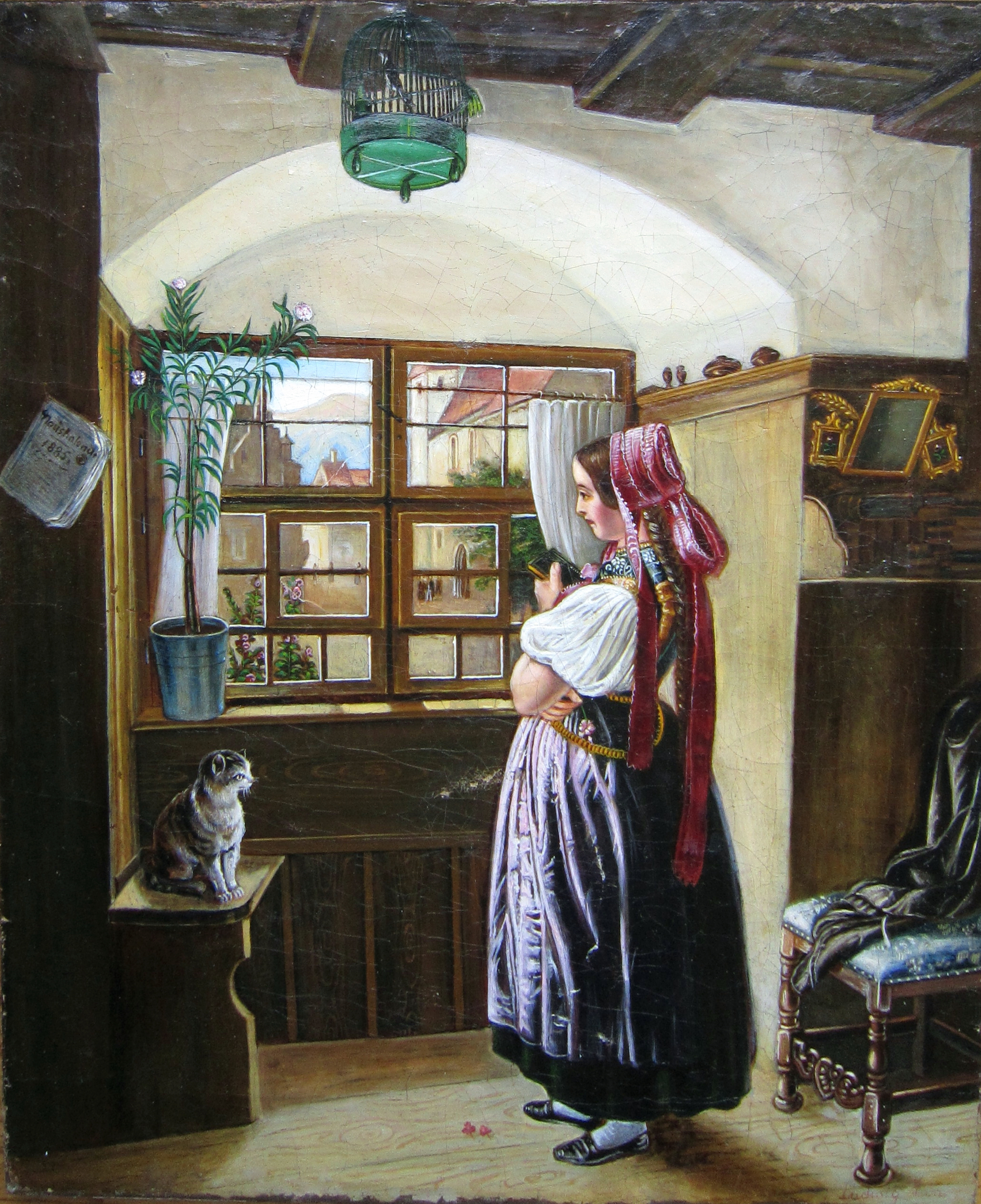 Original painting about 1846, Galerie Neue Meister Dresden, Inventarnummer Gal.-Nr. 2379